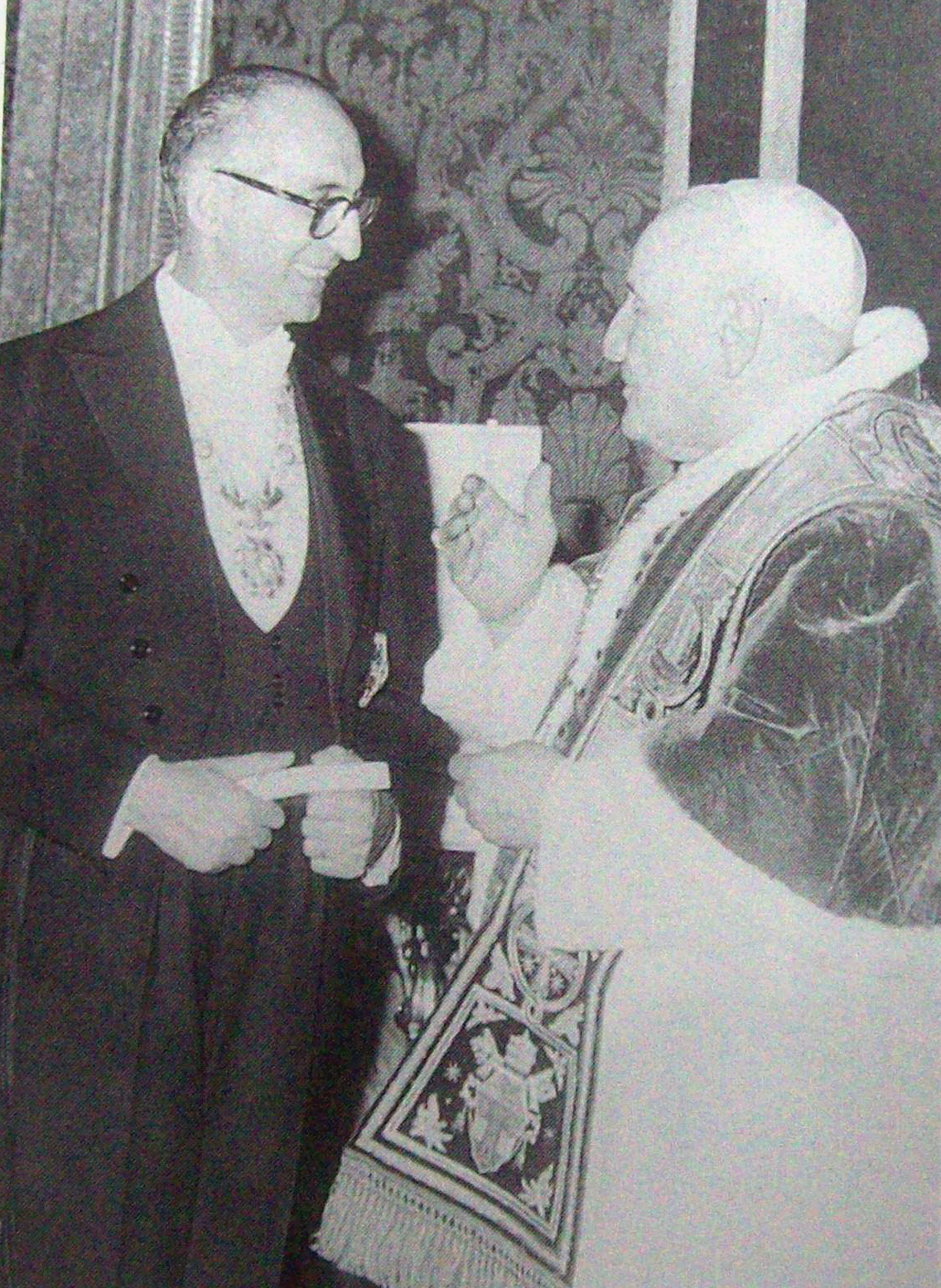 Es una foto del presidente de Argentina Arturo Frondizi (izquierda) junto al papa Juan XXIII en el año 1960, este papa fue quien le dio el apodo a este Presidente de "el estadista de america", además dijo que en Italia tenía que haber políticos como él.